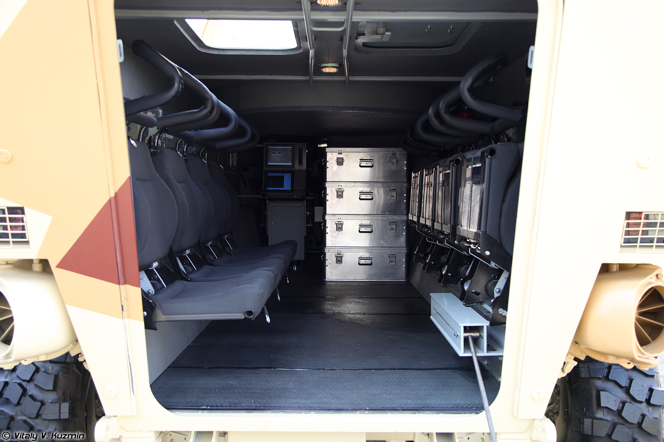 Колесная БМП Атом (Atom IFV)